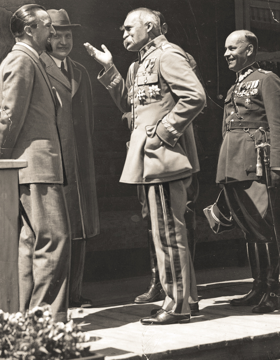 Wizyta ministra spraw zagranicznych Włoch Dino Grandiego w Polsce. Minister spraw zagranicznych Włoch Dino Grandi (1. z lewej) w rozmowie z Marszałkiem Polski Józefem Piłsudskim (2. z prawej) na werandzie willi "na Pogance". Obok widoczni: minister spraw zagranicznych Polski August Zaleski (2. z lewej) i ppłk Feliks Kamiński (1. z prawej).